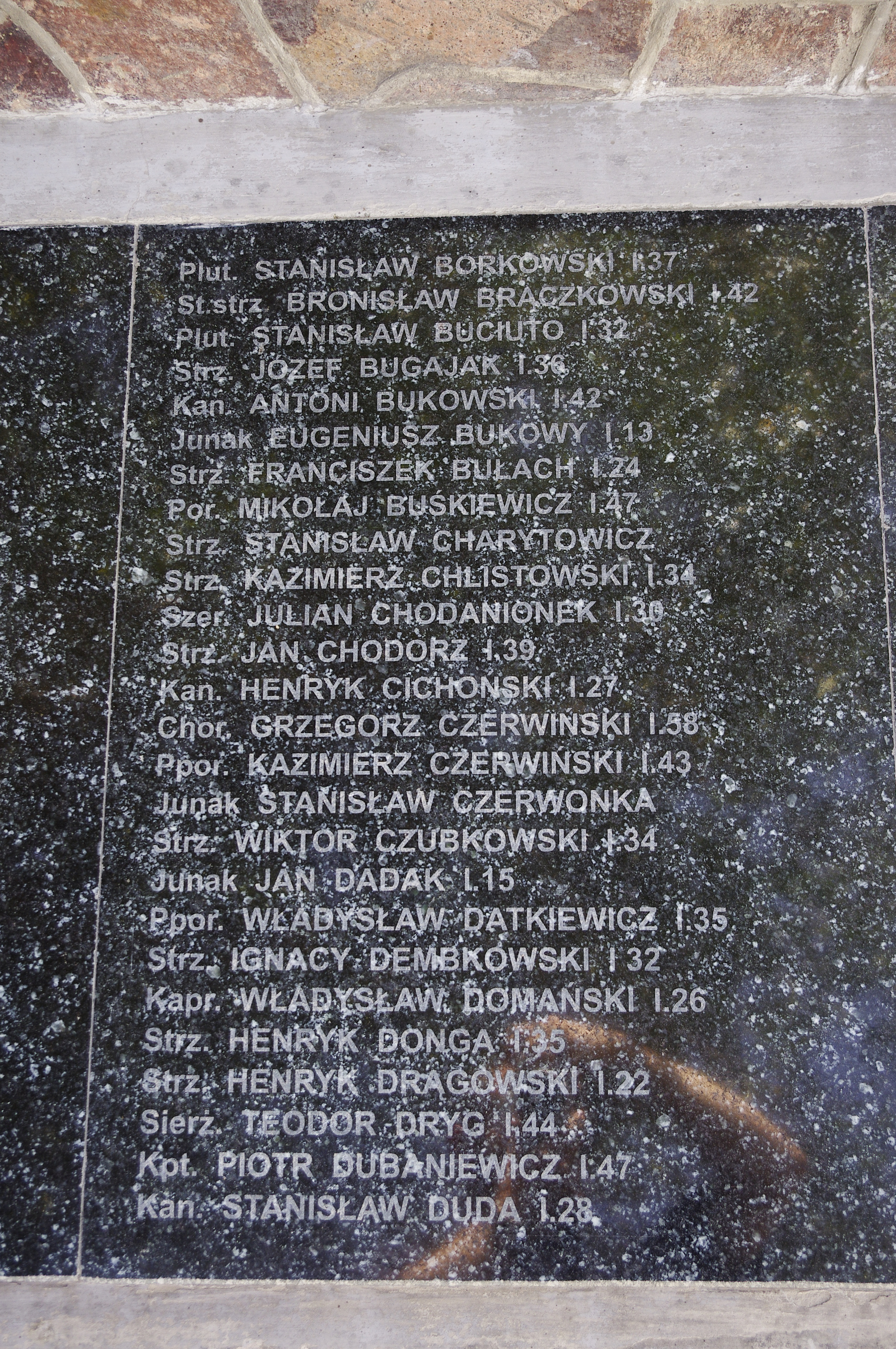 The making of this document was supported by Wikimedia Polska. To zdjęcie zostało wykonane podczas Wikiwyprawy 2015.Wszystkie zdjęcia z wyprawy możesz zobaczyć w kategorii: Wikiwyprawa 2015. English | polski | +/− To zdjęcie zostało załadowane dzięki współpracy z firmą Hyperbook. polski | +/− To zdjęcie zostało załadowane dzięki współpracy z firmą: Kopex Group. English | polski | +/−